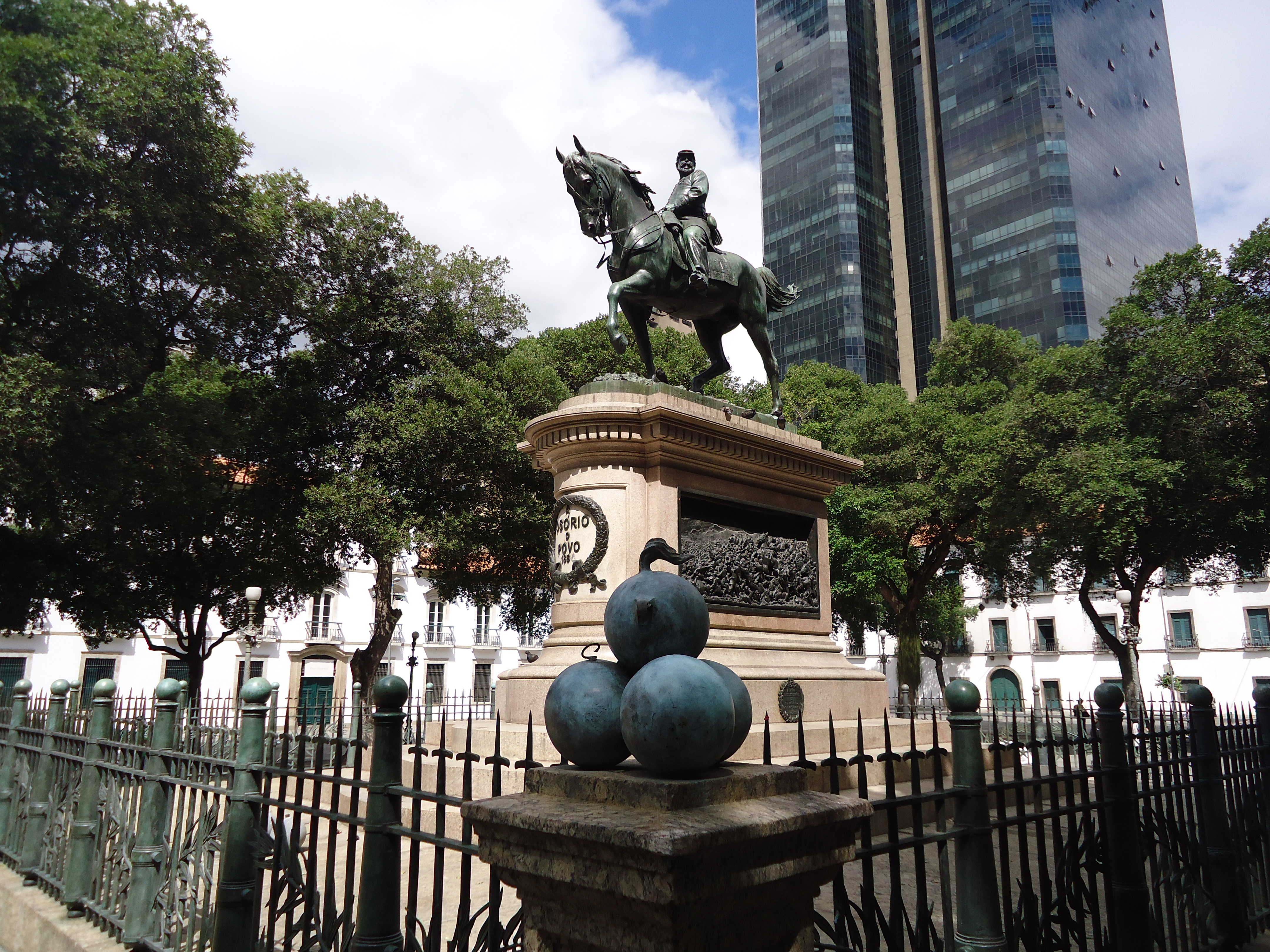 Praça XV, centro histórico da cidade do Rio de Janeiro, estado do Rio de Janeiro, Brasil: estátua equestre em homenagem ao General Osório.